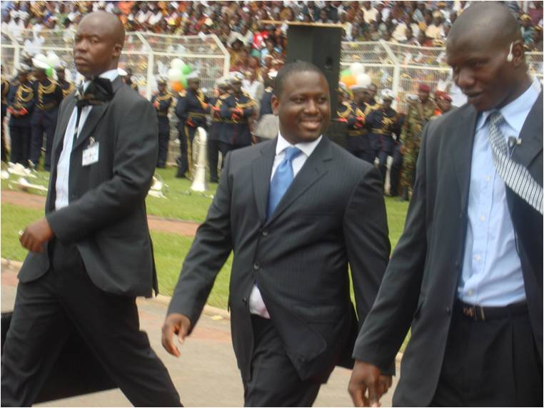 Monsieur Guillaume Soro, Premier ministre (Côte d'Ivoire)